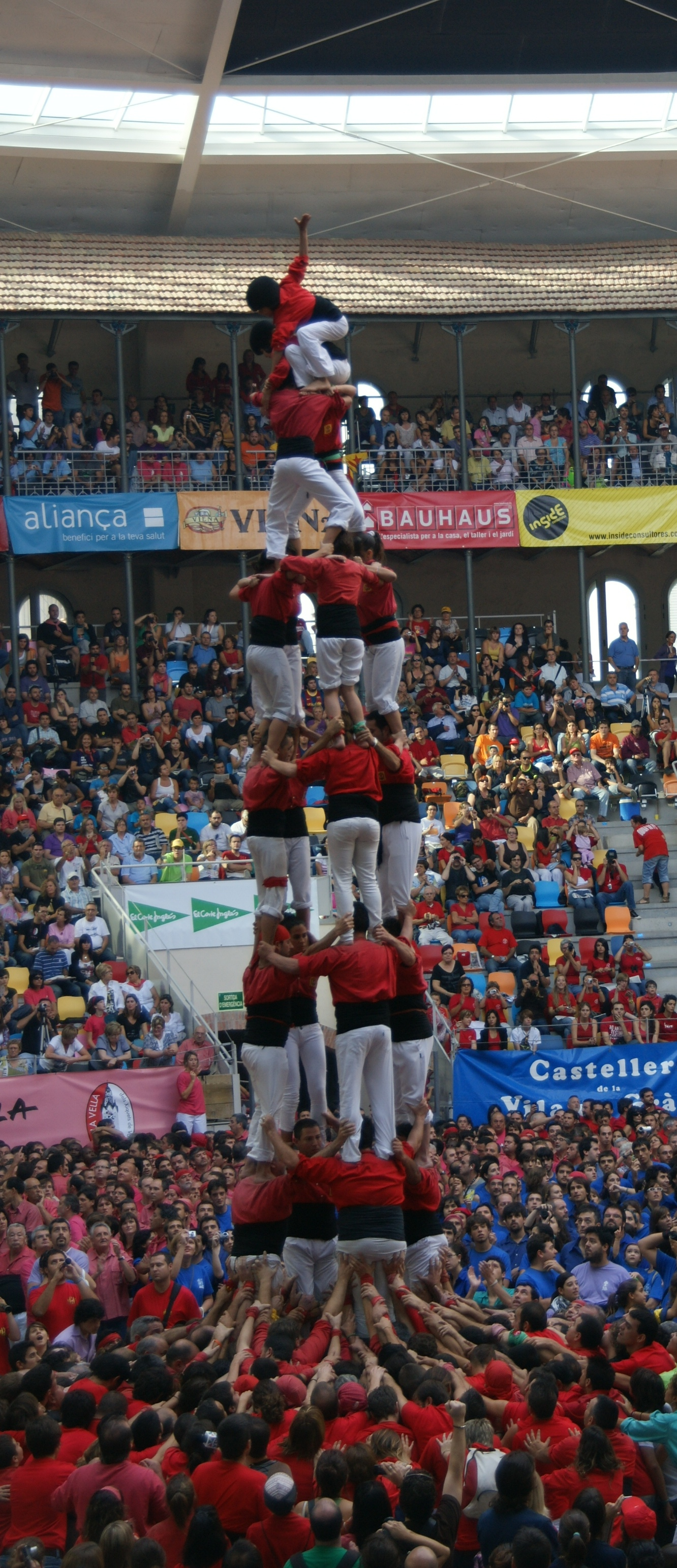 Xicots de Vilafranca, 4 de 8 descarregat. Concurs de 2010.